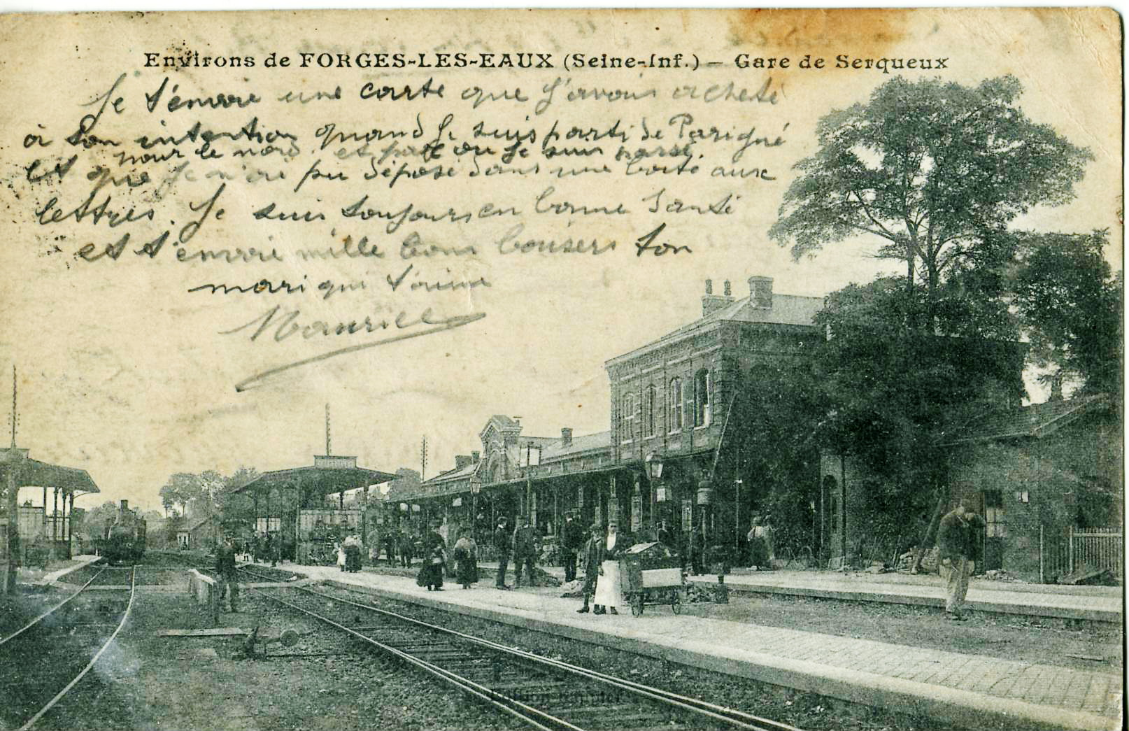 Carte postale ancienne sans mention d'éditeur, collection Environs de Forges-les-Eaux : SERQUEUX - La Gare